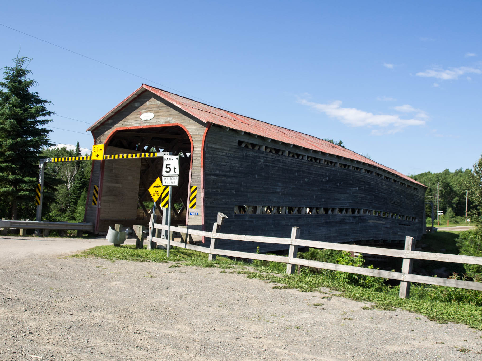 Pont du Sault, St-Adalbert,QC